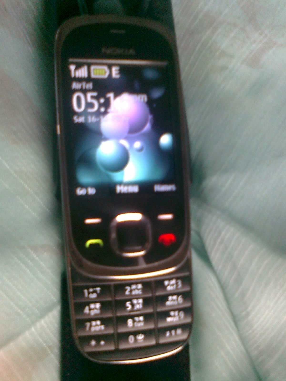 Nokia 7230 Black Body